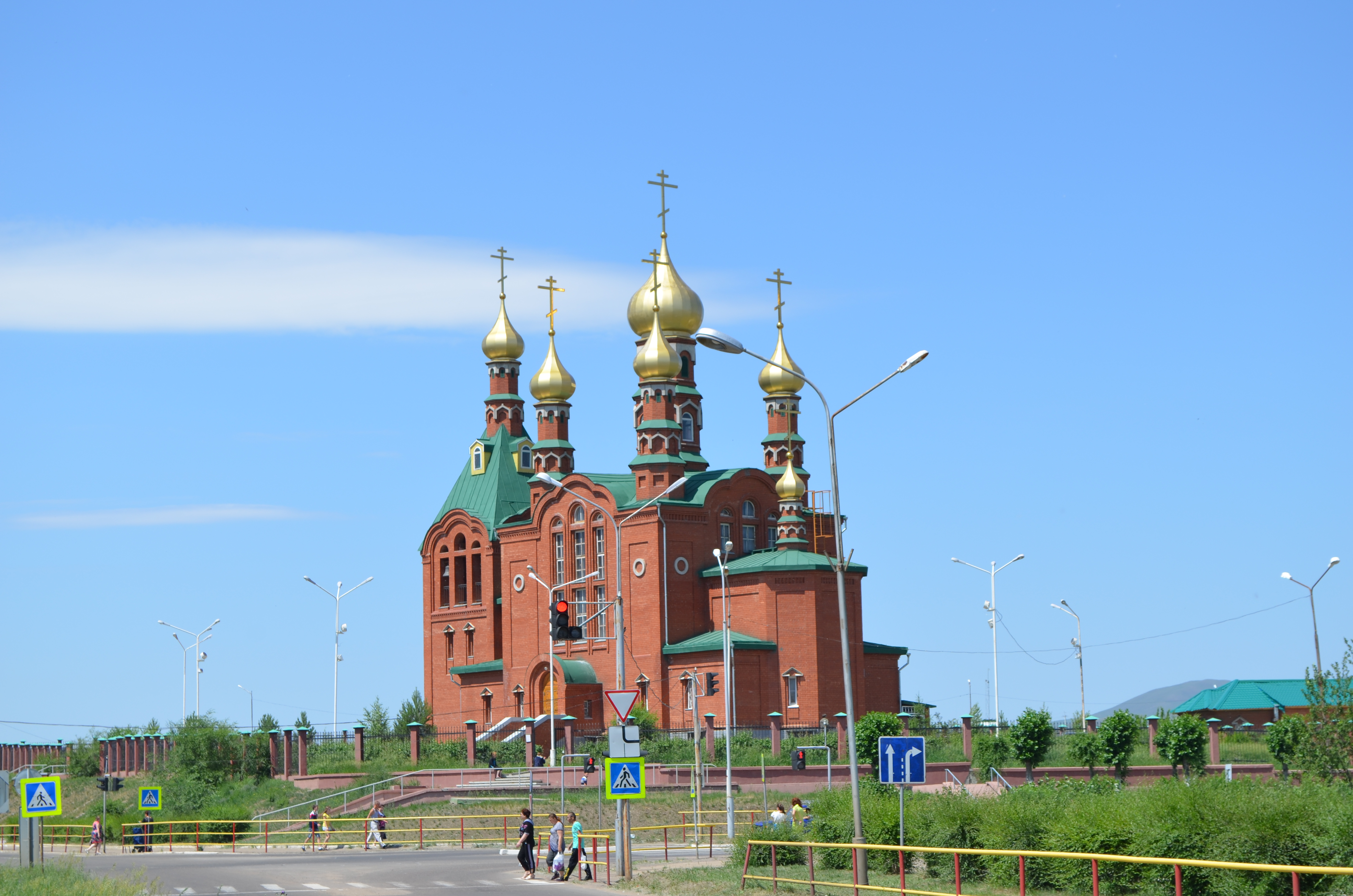 снимки конца июня - начала июля 2015 г.